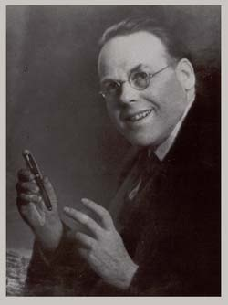 Walter Johannes Stein (1891 - 1957)